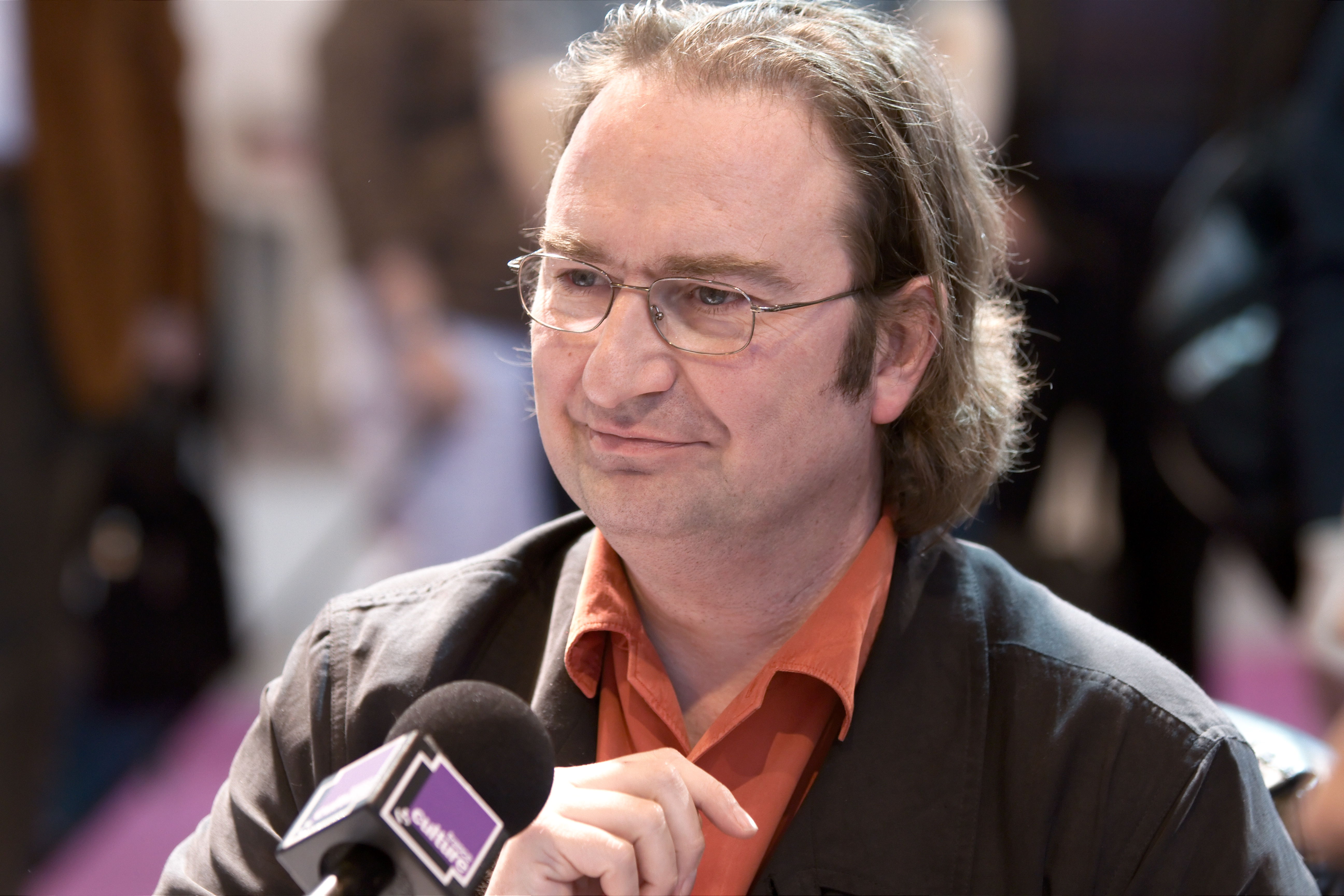 L'animateur radio François Angelier en direct du Salon du livre de Paris pour l'émission Tout arrive !